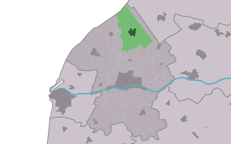 Kaartsje fan himrik fan Tsjummearum